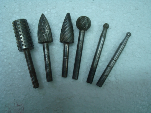 Différents types de limes rotatives pour modeleur